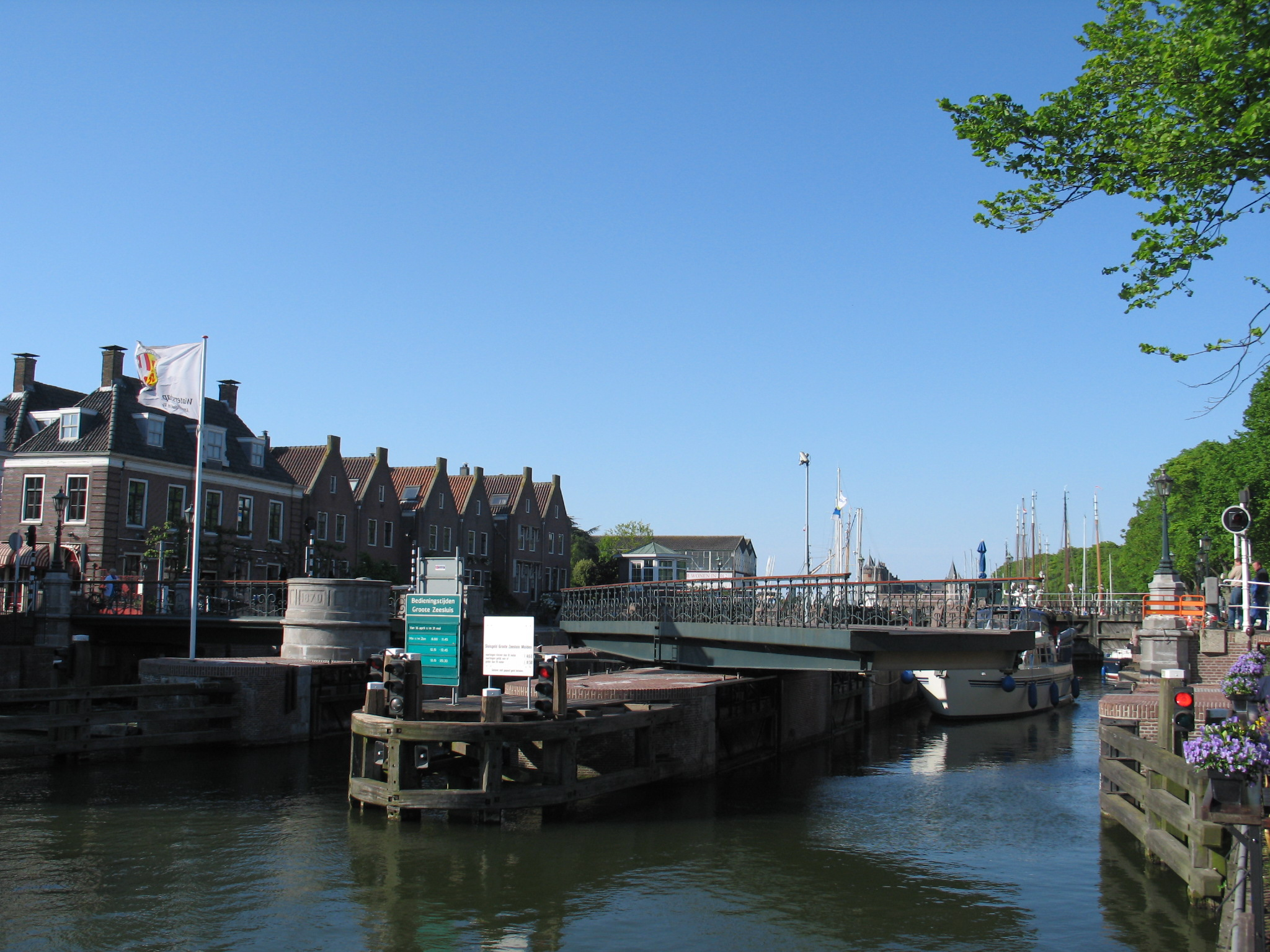 rijksmonument in Muiden